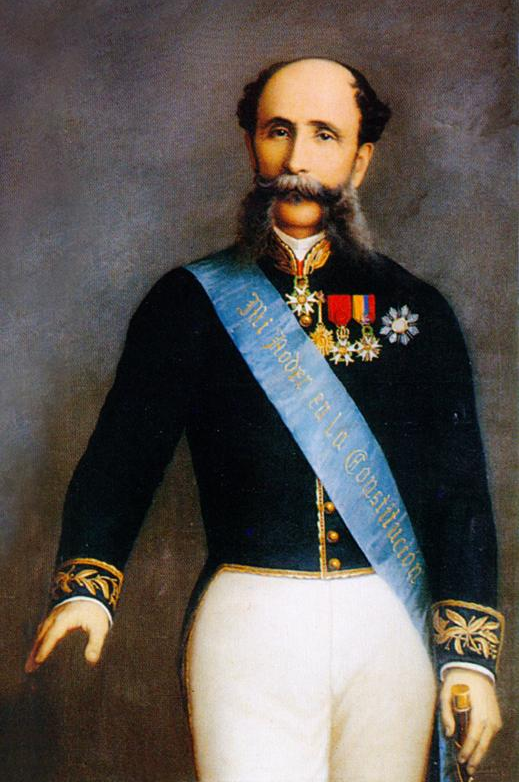 Retrato oficial de Antonio Flores y Jijón de Vivanco, presidente de Ecuador (1888-1892), expuesto en el Salón Amarillo del Palacio de Carondelet, Quito.